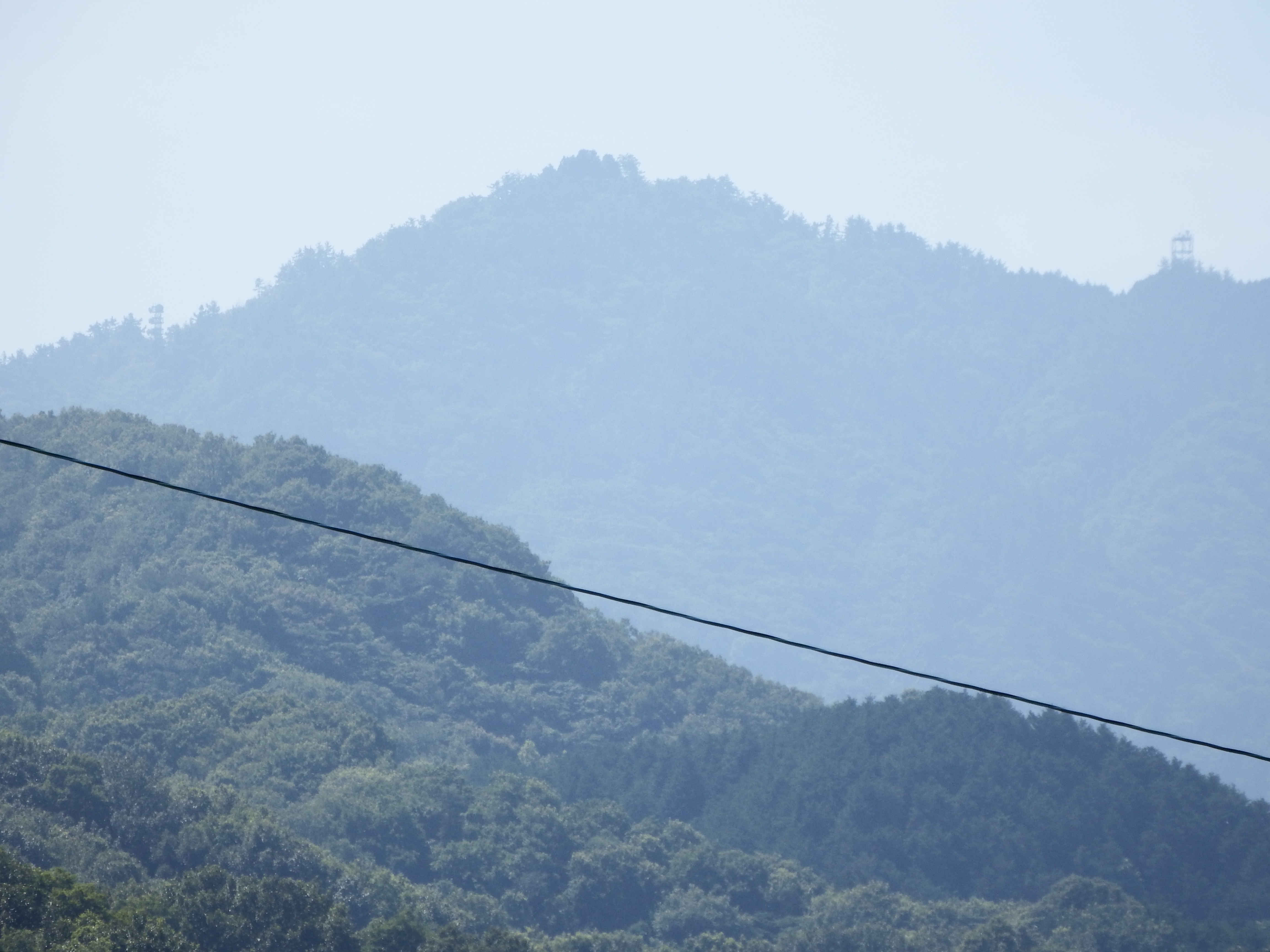 女体山の山頂部分